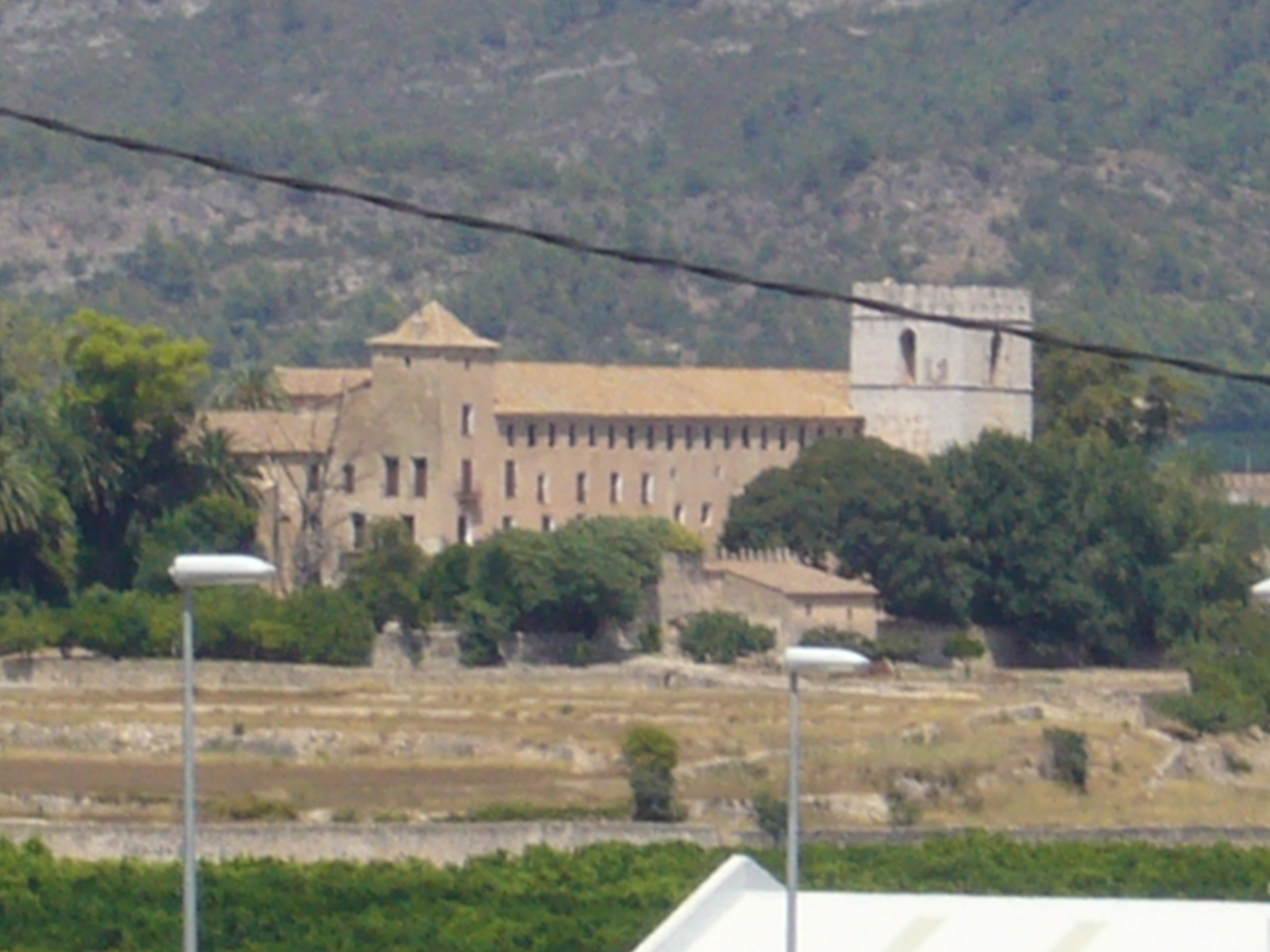 Convent o Monestir de Sant Jeroni de Cotalba. La Safor. País Valencia